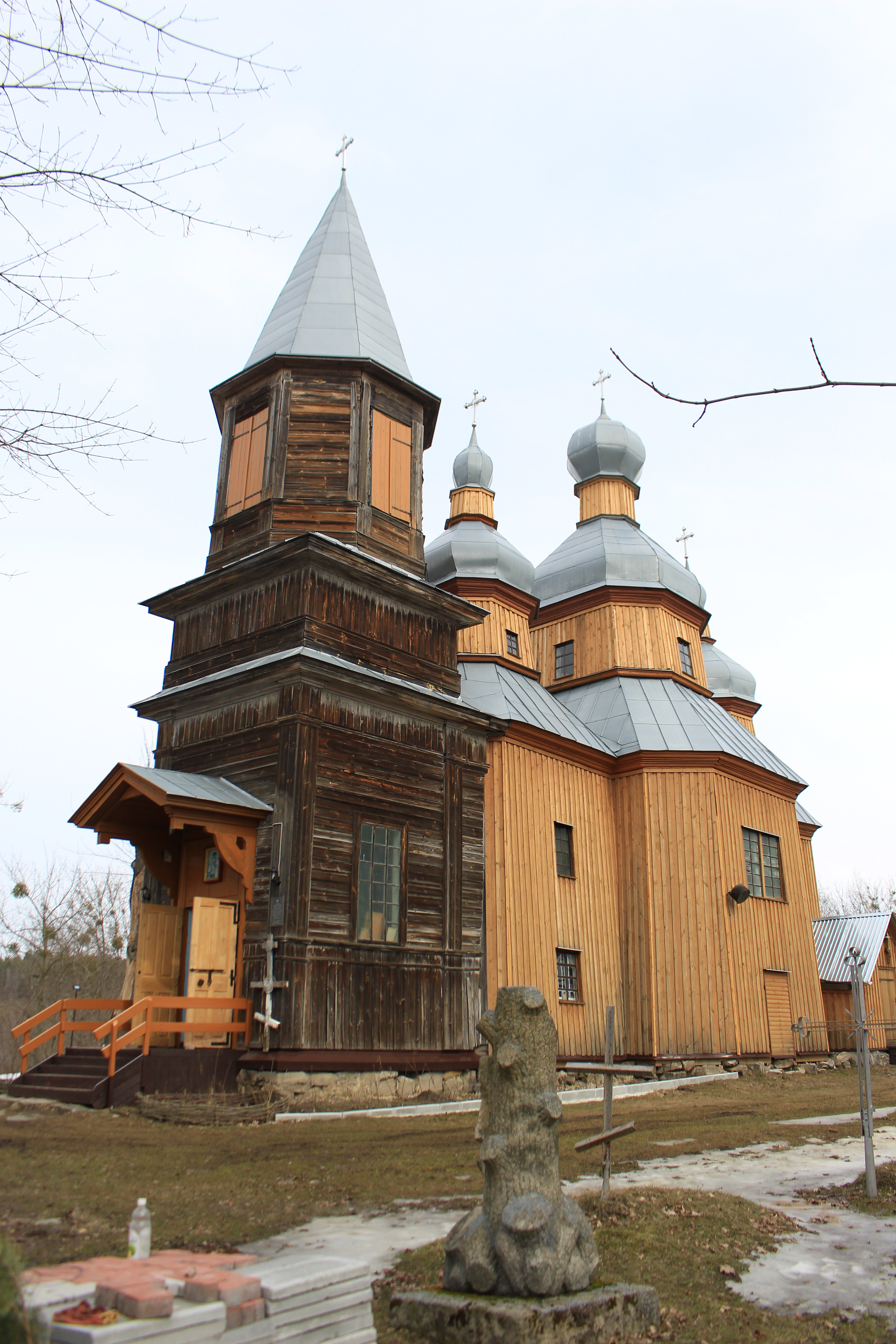 Церква Різдва Богородиці (дер.), село Тулинці